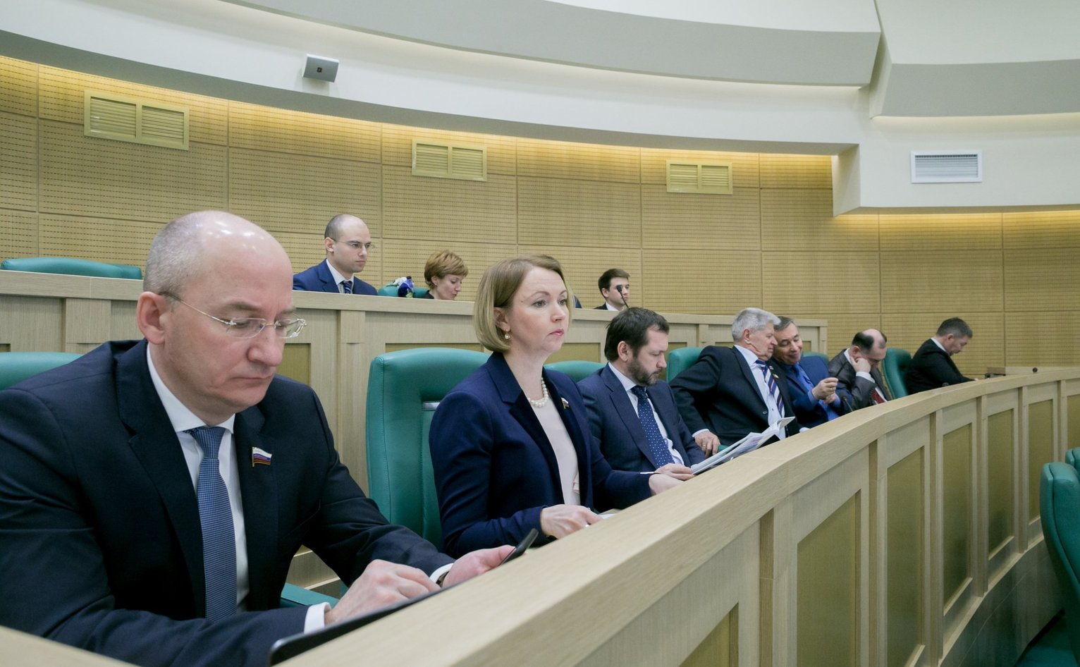 Члены Совета Федерации Федерального Собрания Российской Федерации Цепкин, Олег Владимирович и Гехт, Ирина Альфредовна